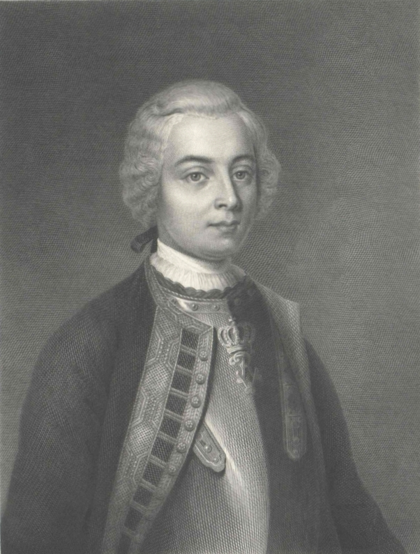 Hans Hermann von Katte (1704–1730)